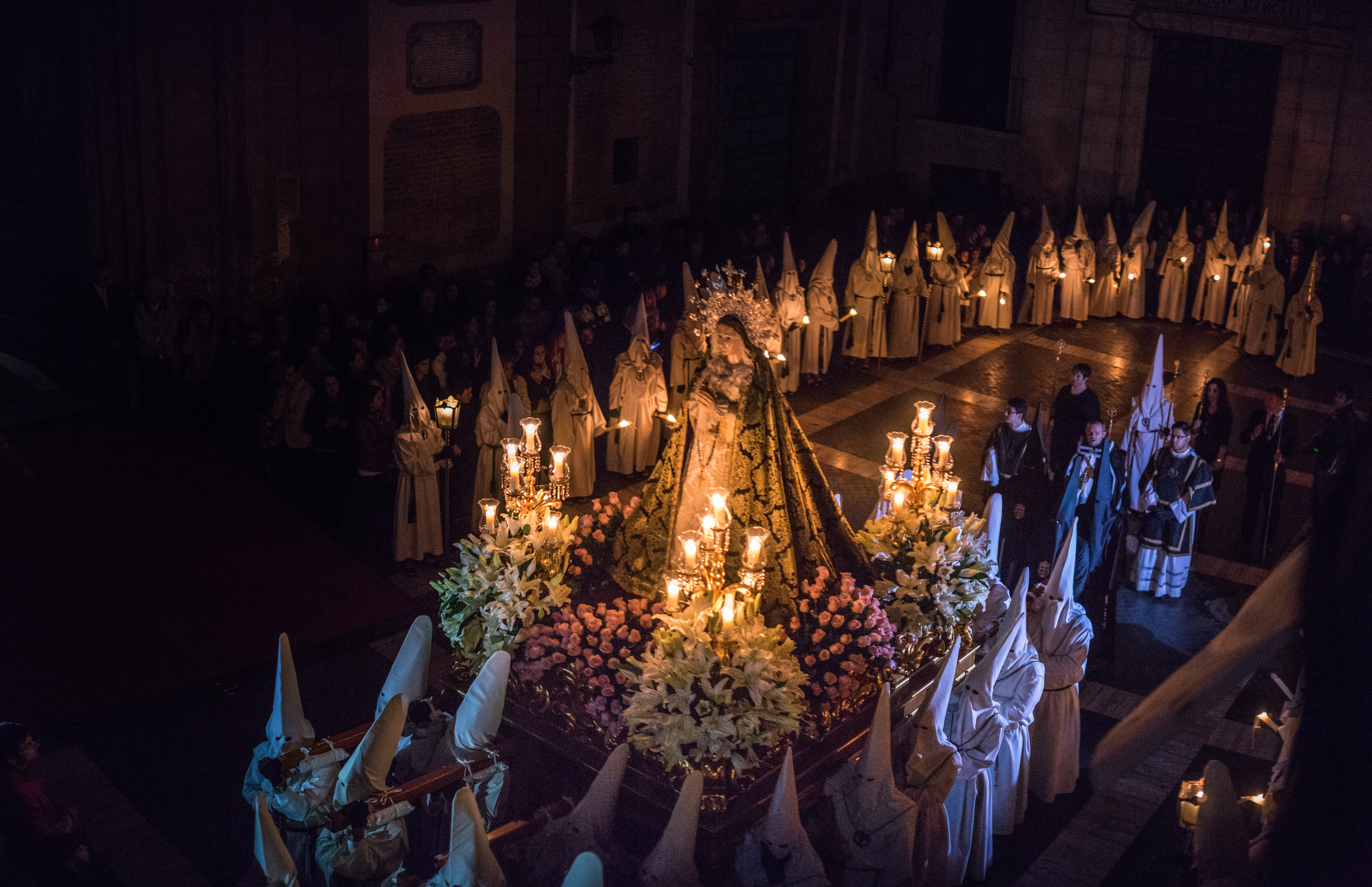 Cofradía del Yacente. Nuestra Señora de la Luz en la Soledad en la entrada a San Juan de Dios. This is a photography of a Folklore festival in Spain (Wikidata id Q5685566).